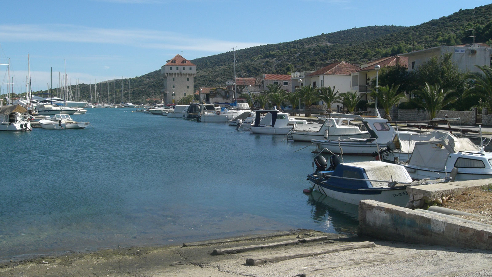 Marina, Hrvatska